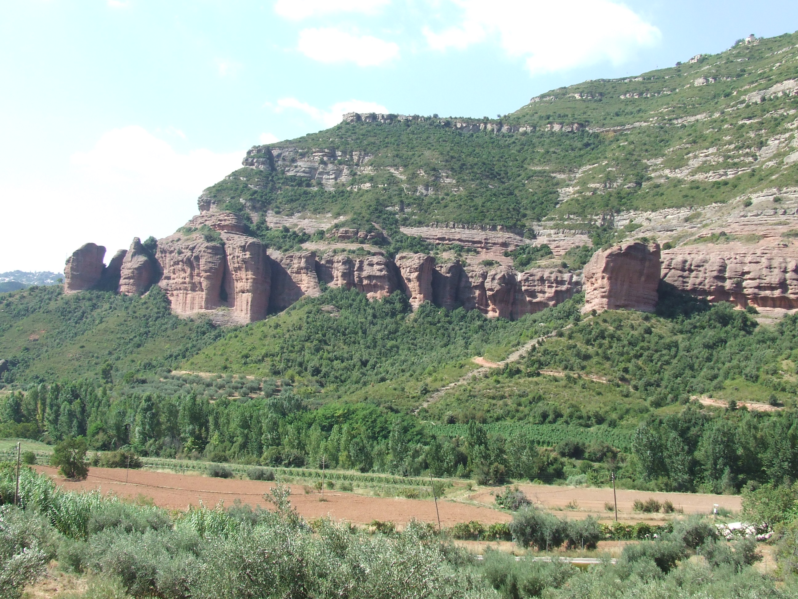 La Roca Rodona (Riells del Fai, Bigues i Riells, Vallès Oriental)